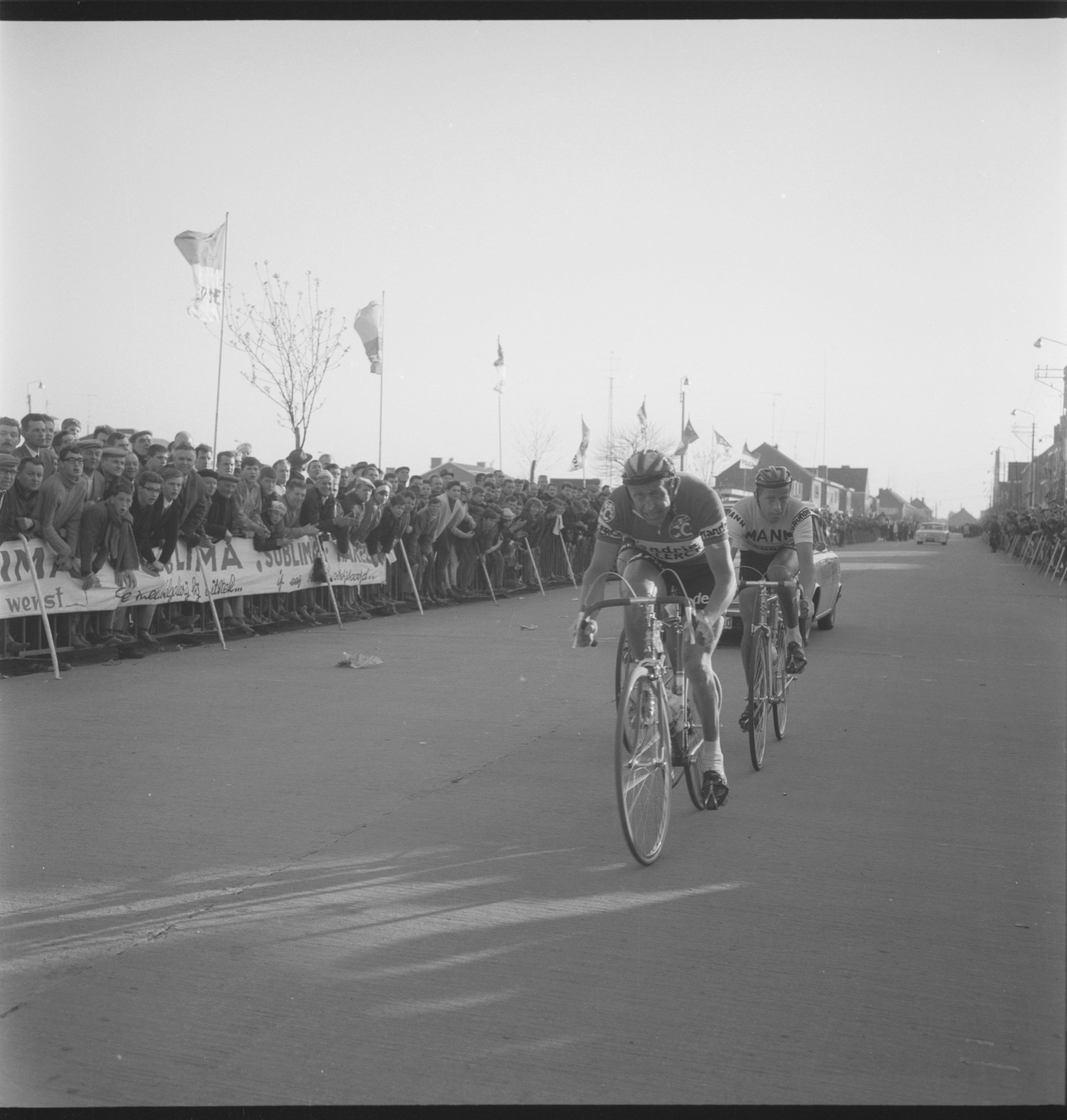 Armand Desmet op kop in de straten van Harelbeke tijdens de E3 Prijs Harelbeke 1967. Mantie won de allereerste editie van deze wedstrijd in 1958, voor stadsgenoten Lucien Demulder en Briek Schotte.